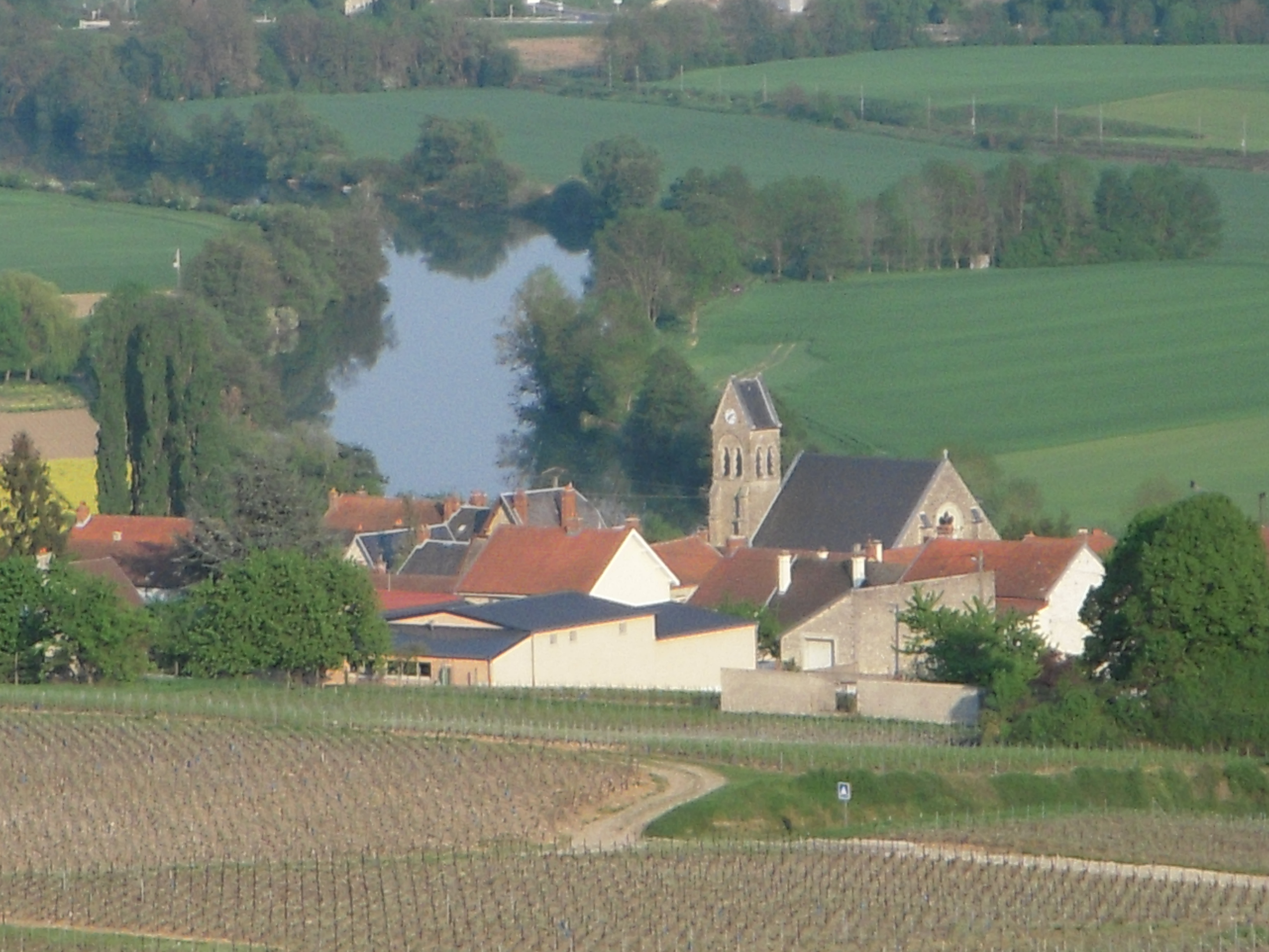 Vincelles (Marne) vue de la montée de la Sainte